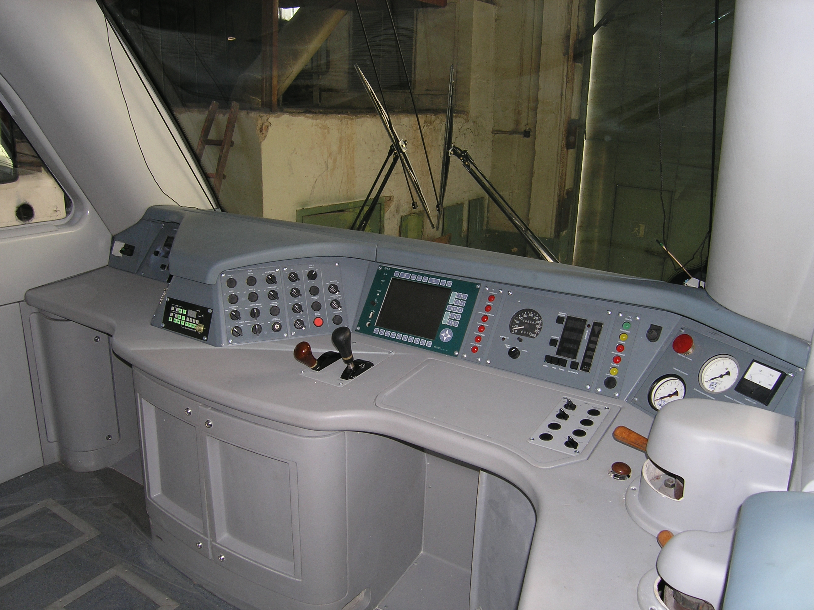 Тепловоз ТЭП150 - Кабина машиниста.